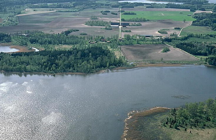 Sjön Väringen med Kägleholm i bakgrunden. Motiv: Kägleholm Nyckelord: Flygbilder, Riksintressen Kategori: Insjömiljöer, Slättbygd Sjön Väringen med Kägleholm i bakgrunden.